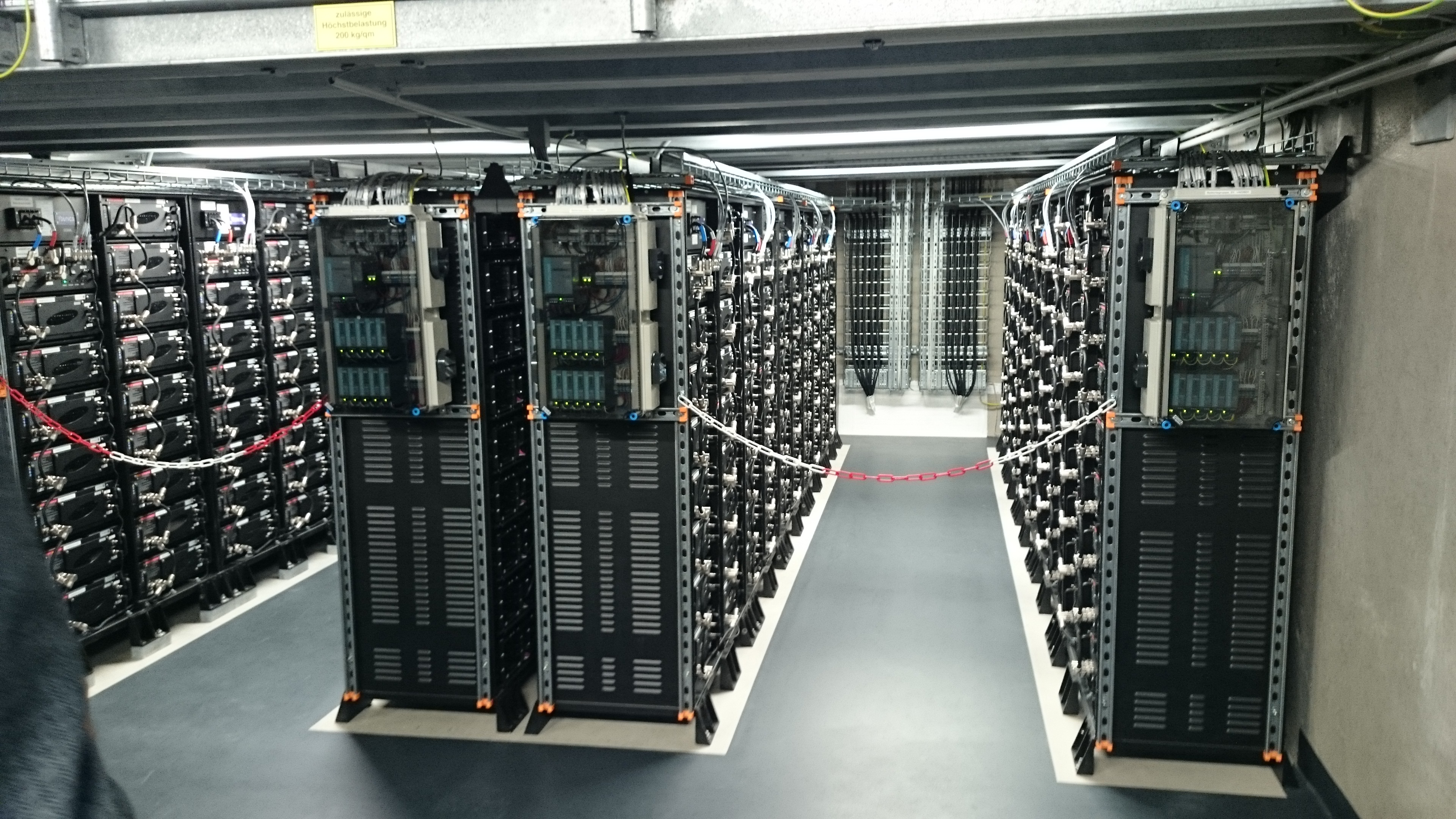 WEMAG Batterie-Speicherkraftwerk Schwerin - Erdgeschoss der Halle. Nach Schilderung des Betreibers befinden sich die in modularen Reihen angeordneten Akkus in einem ständigen rechnergesteuerten und bedarfabhängigen Zyklus der Be- und Entladung, der die Akkulaufzeit des Speicherkraftwerks optimieren soll.